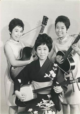 かしまし娘1956年ブロマイド